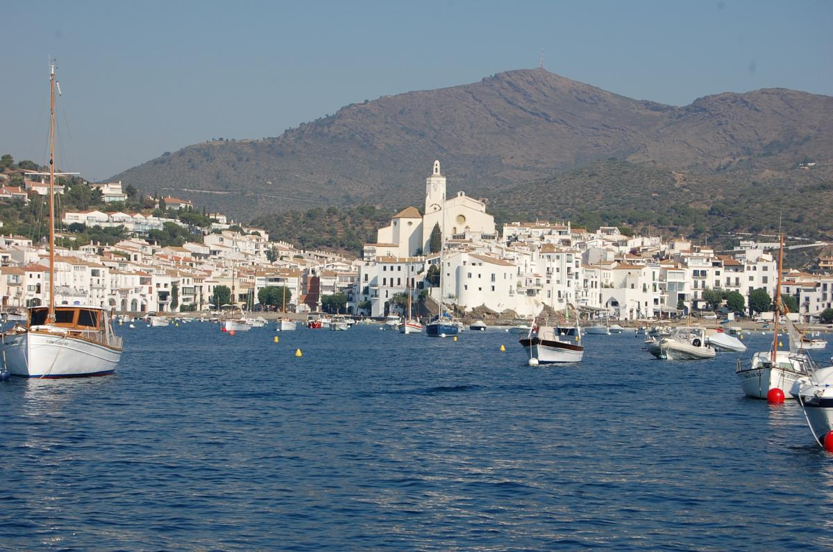 Fondeado en la bahía de Cadaqués